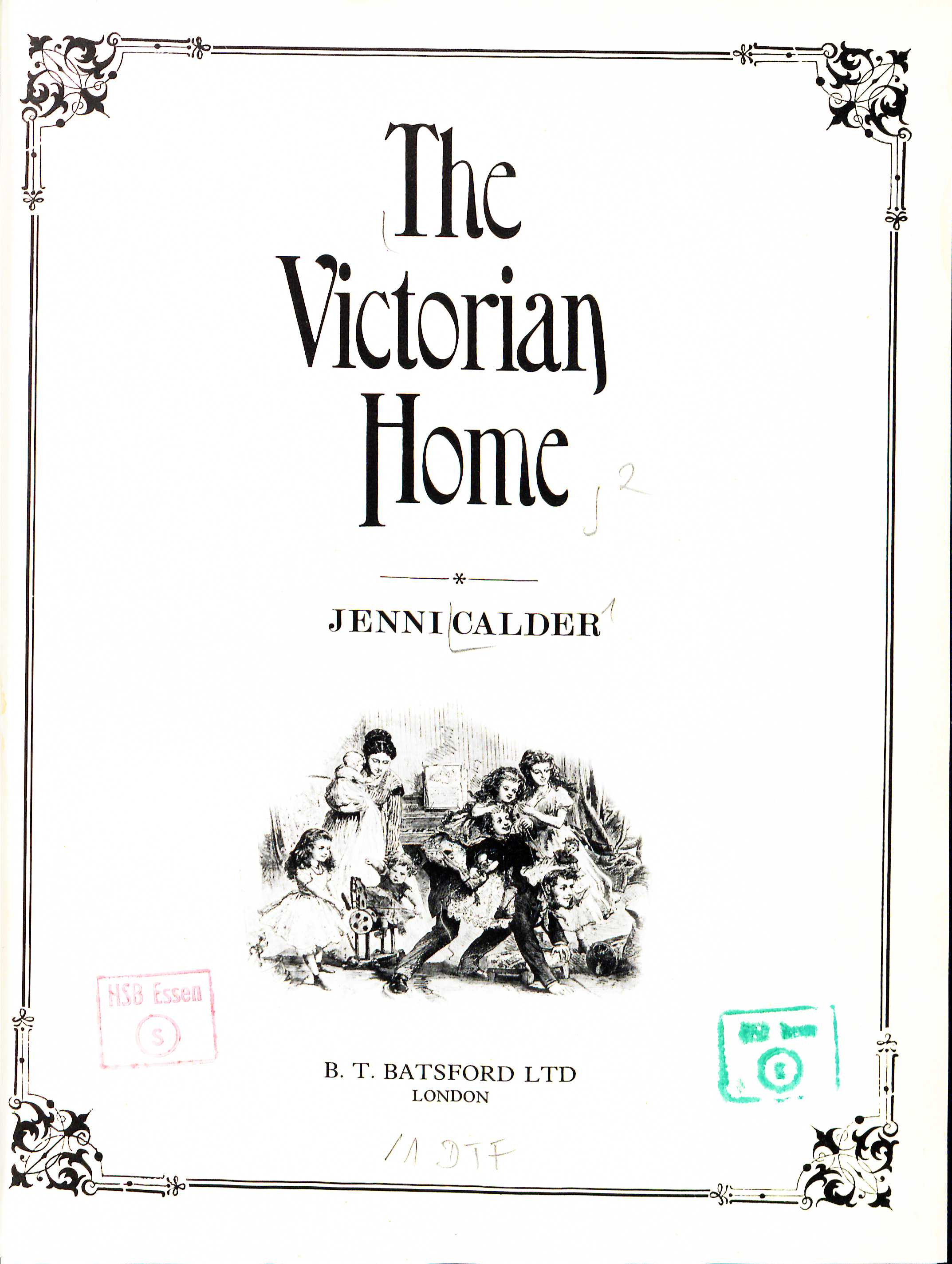 Jenni Calder Victorian Home Titel. Full illustration on p. 80, no apecific author of the picture is given: Illustration from the Publisher's collection (Ackn. on p. 8)